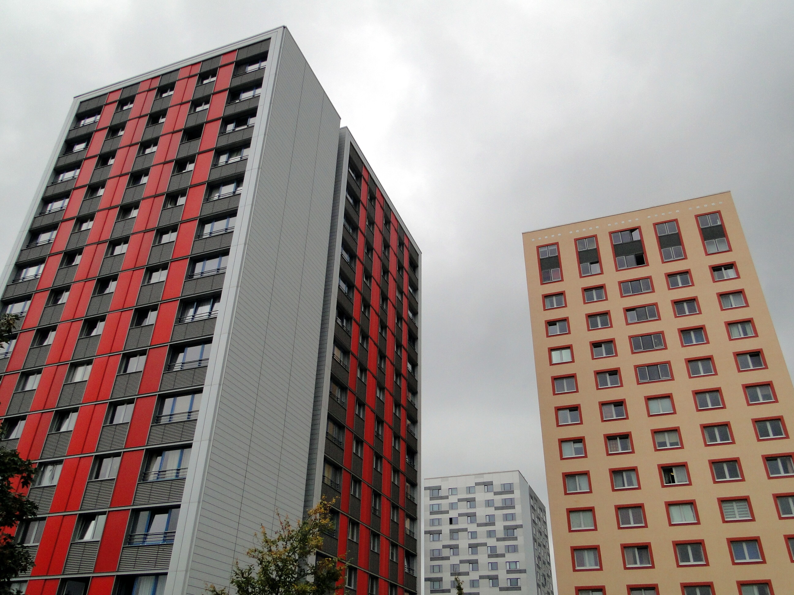 Studentenwohnheime des Studentenwerks Dresden auf der Wundtstraße